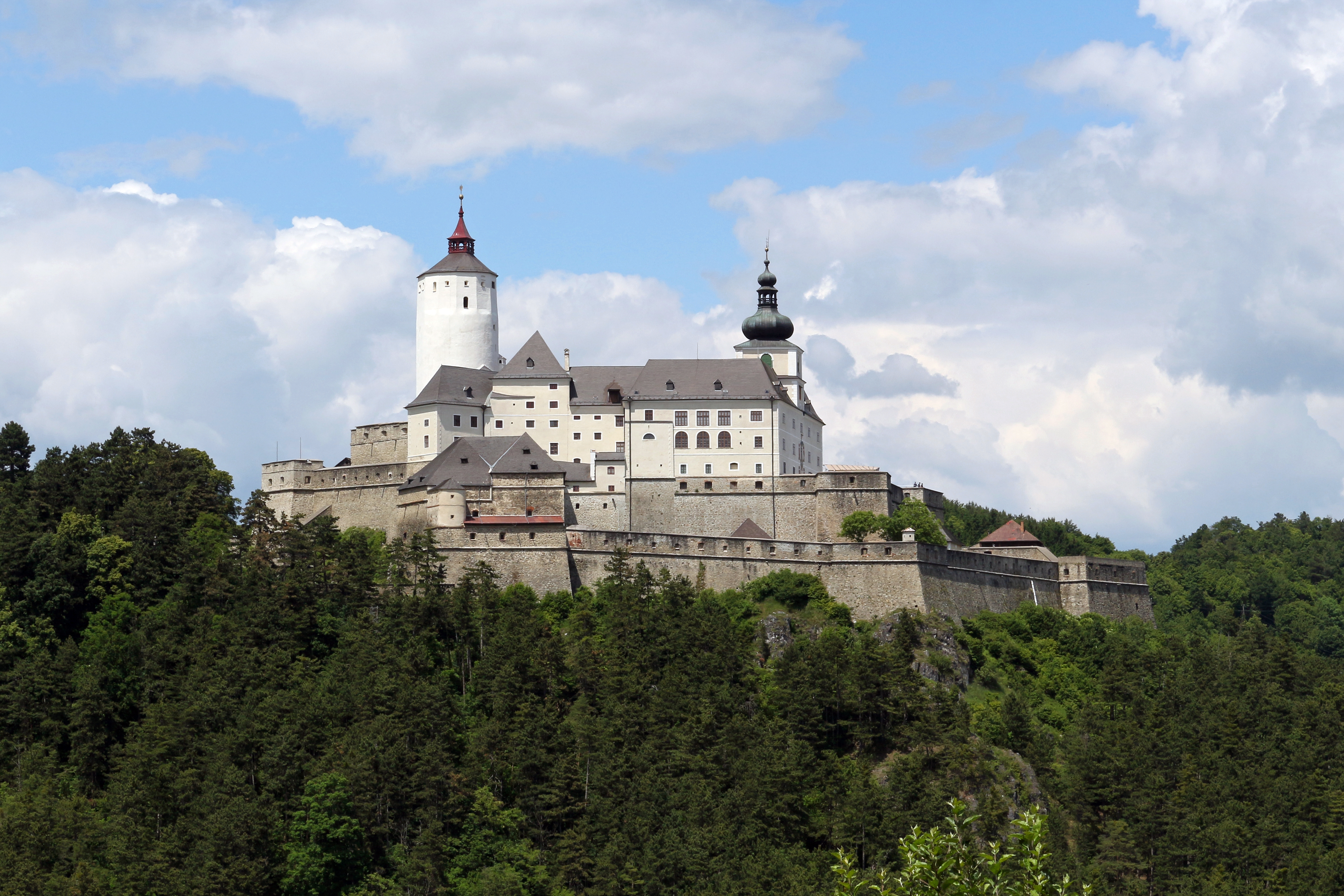 Burg Forchtenstein